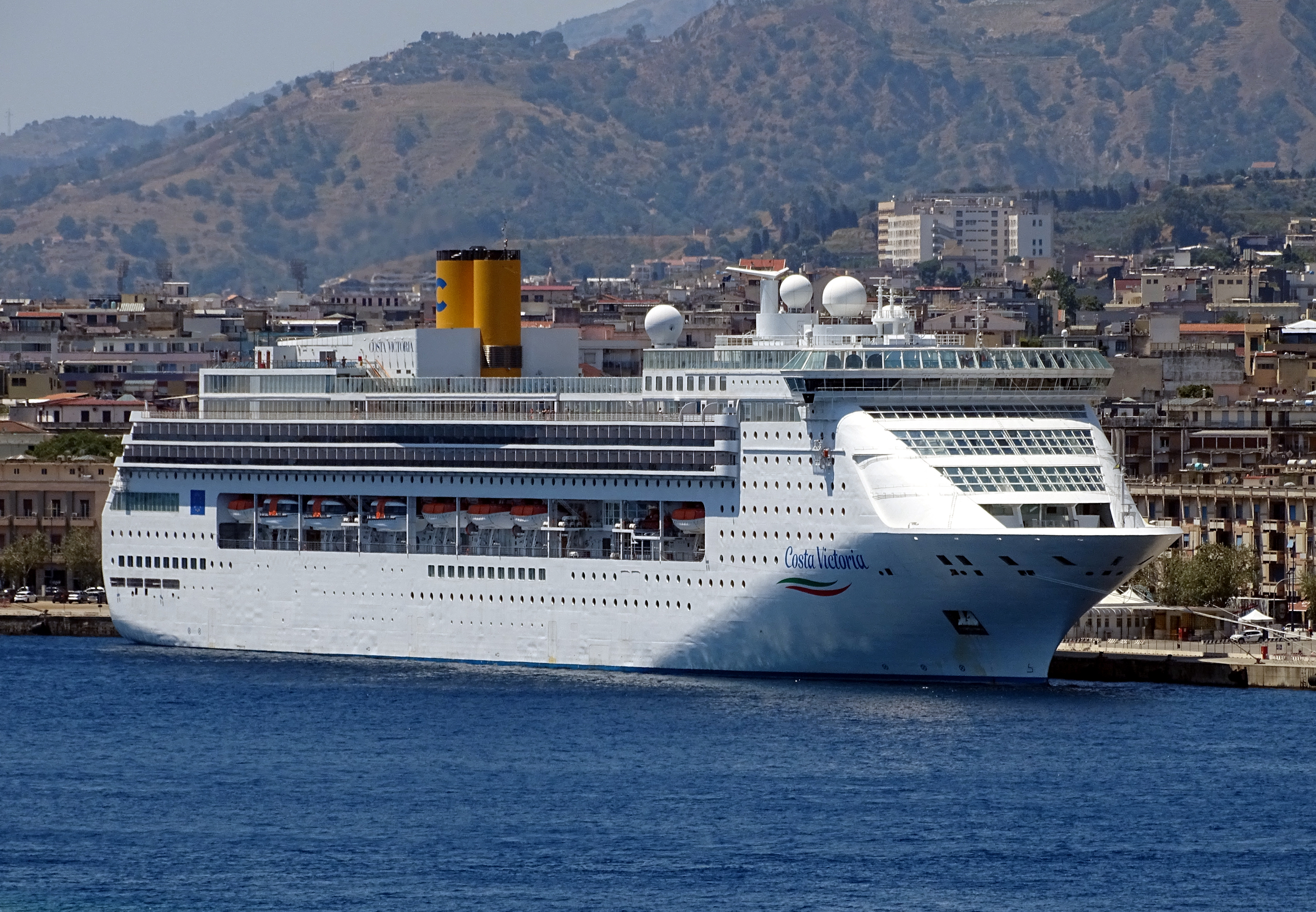 De Costa Victoria in Messina.